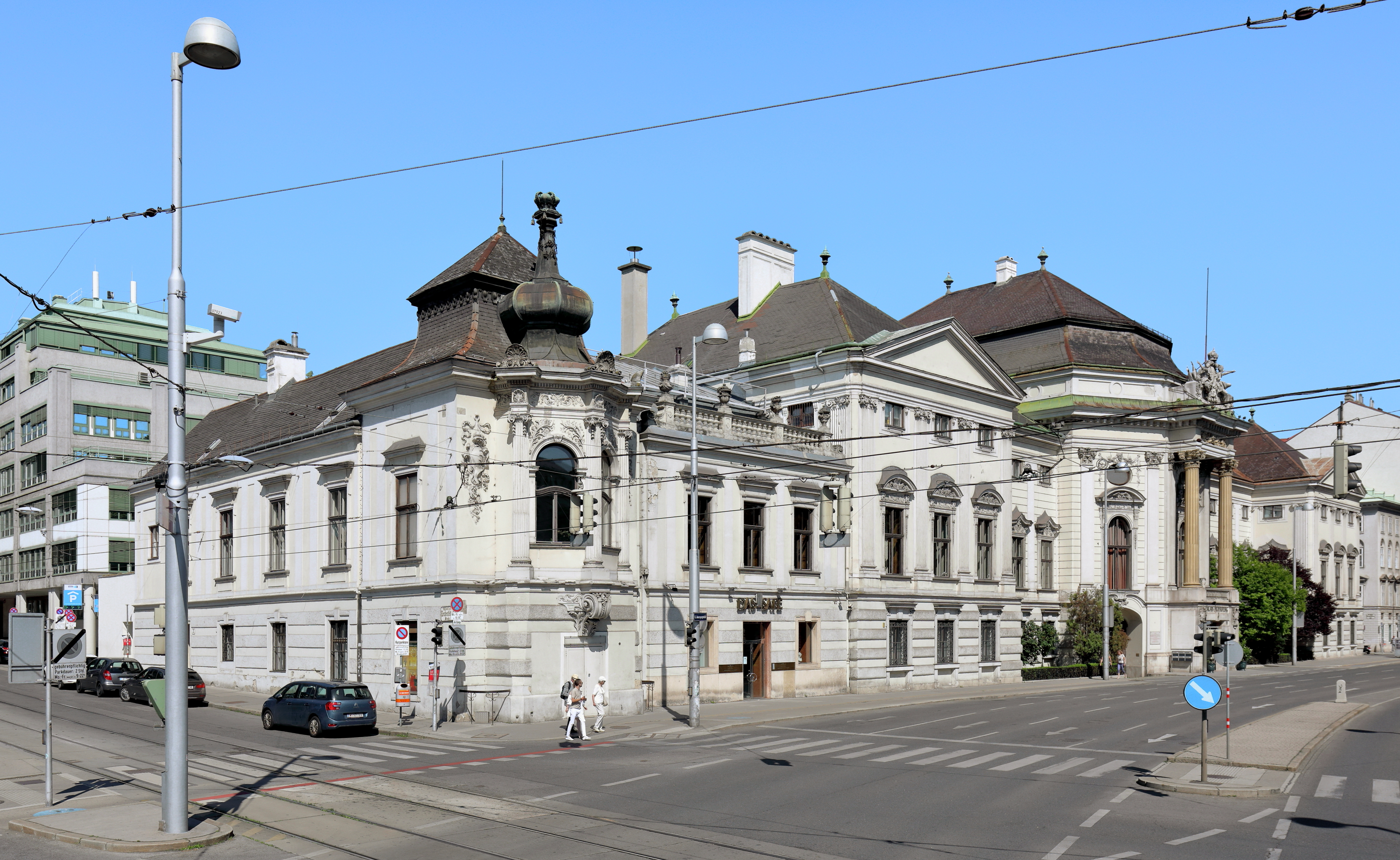 Südostansicht des Palais Auersperg im 8. Wiener Gemeindebezirk Josefstadt.Um 1710 vermutlich nach Entwürfen von Johann Lucas von Hildebrandt als Sommerpalais für Ferdinand Karl Graf Weltz errichtet. Um 1720 Ankauf und Ausbau des Palais durch Hieronymus Marchese Capece di Rofrano. Dabei wurde unter anderem vermutlich von Johann Christian Neupauer der polygonale vorspringende Mittelrisalit angebaut. Um 1780 kam das Palais in den Besitz von Johann Adam Fürst Auersperg und von 1853 bis 1856 erfolgte eine umfassende Restauration.